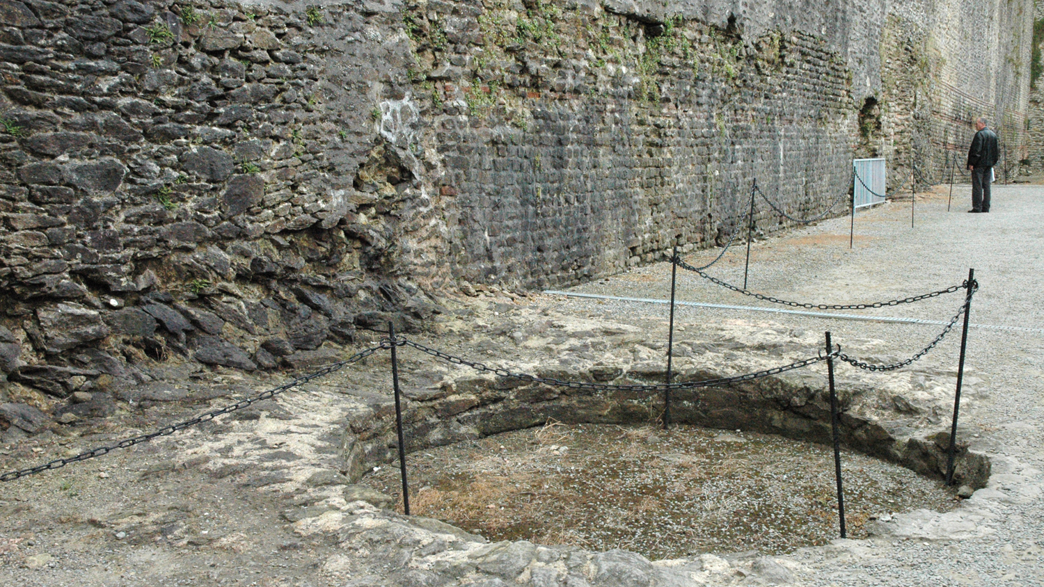 Château de Brest - Empreinte d'une tour Romaine